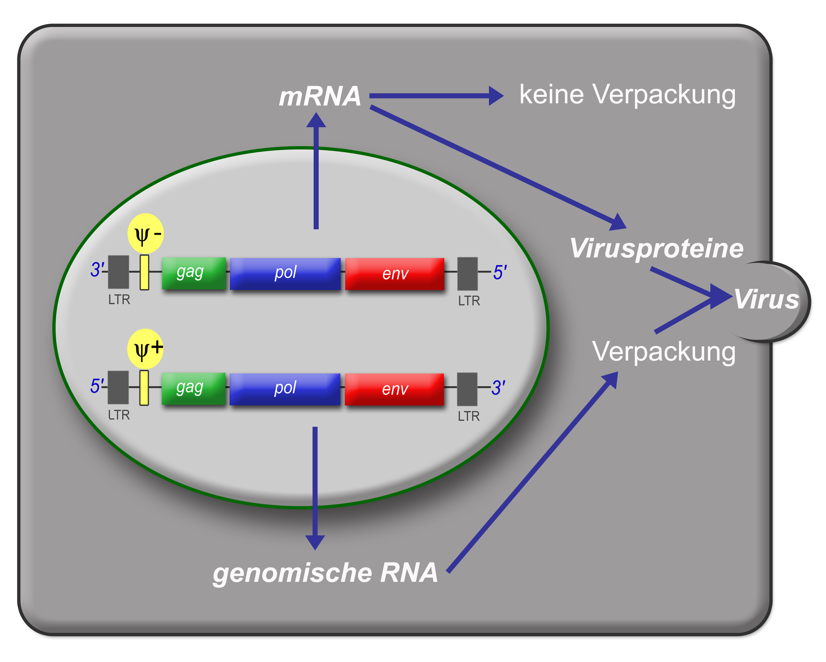 Replikation eines Retrovirus: Aktivität des Verpackungssignals (psi) bei genomischer und subgenomischer RNA